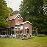 Foto van de cafetaria Meihof Edegem